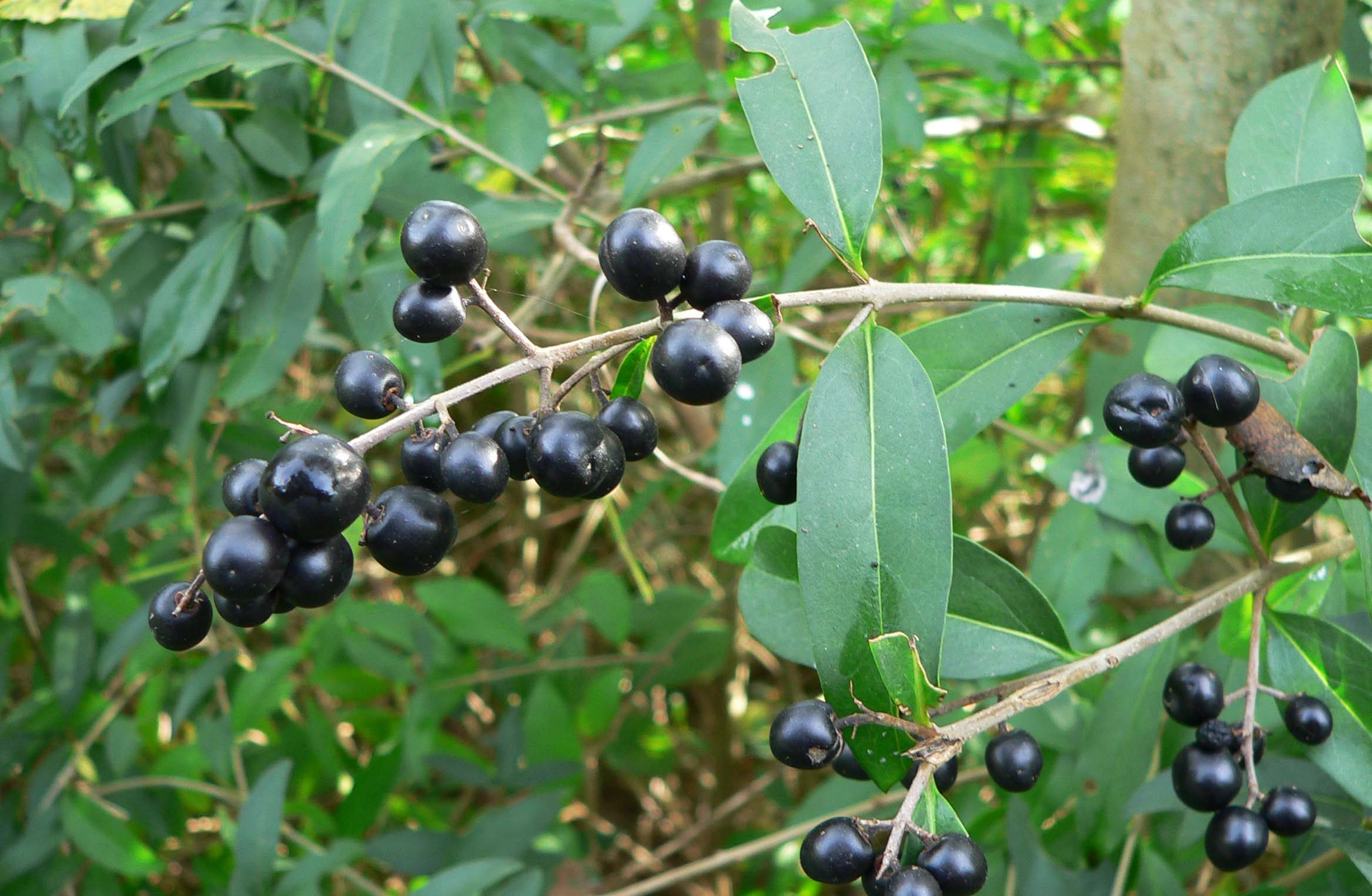 Ligustrum vulgare, troène, fruit, Boutiers 16 France